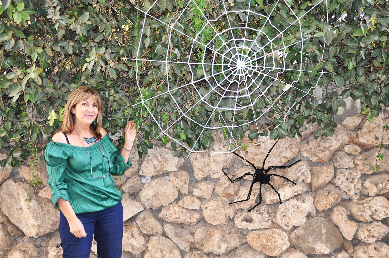 למען שמירת המגוון הביולוגי של בעלי חיים. עכביש טווה חוטים ממטריות ישנות, חוטי צמר ועיצוב מקפסולות קפה כחרקים. In order to preserve the biodiversity of animals. Spider and cobweb old umbrella sculpted, yarn and design coffee capsules insects